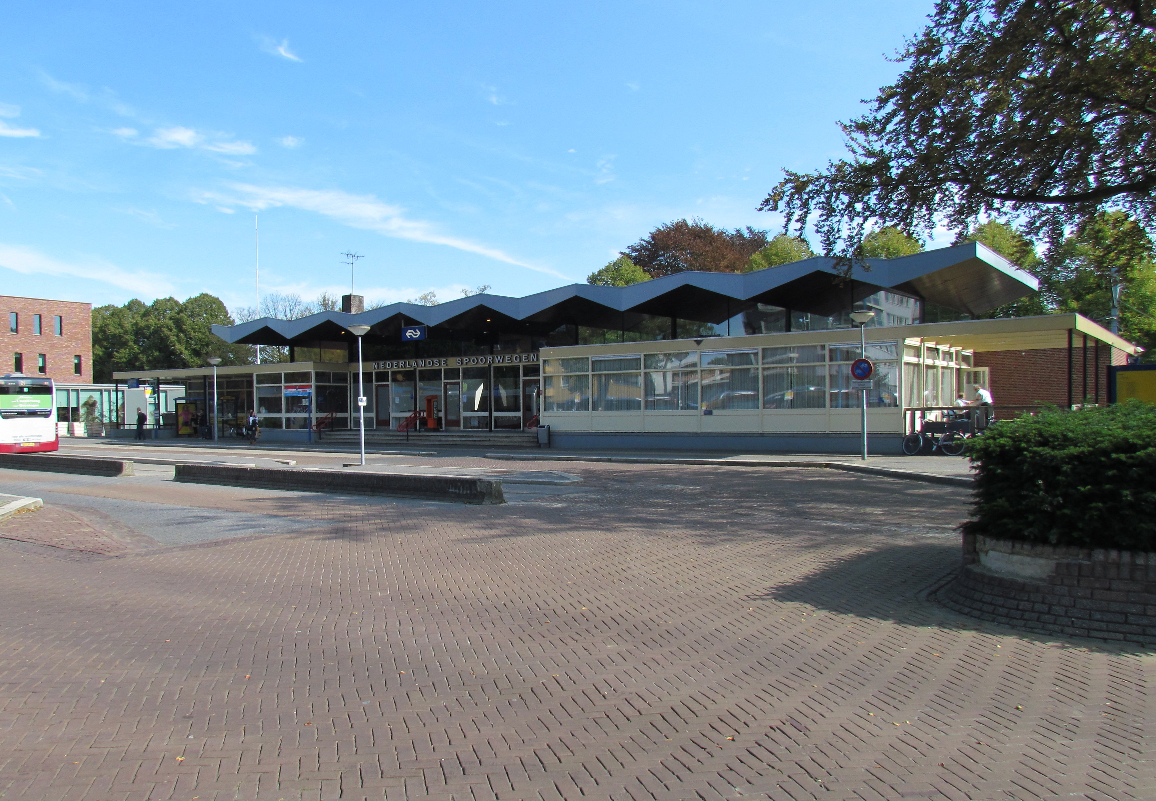 Station Emmen, Drenthe, NL